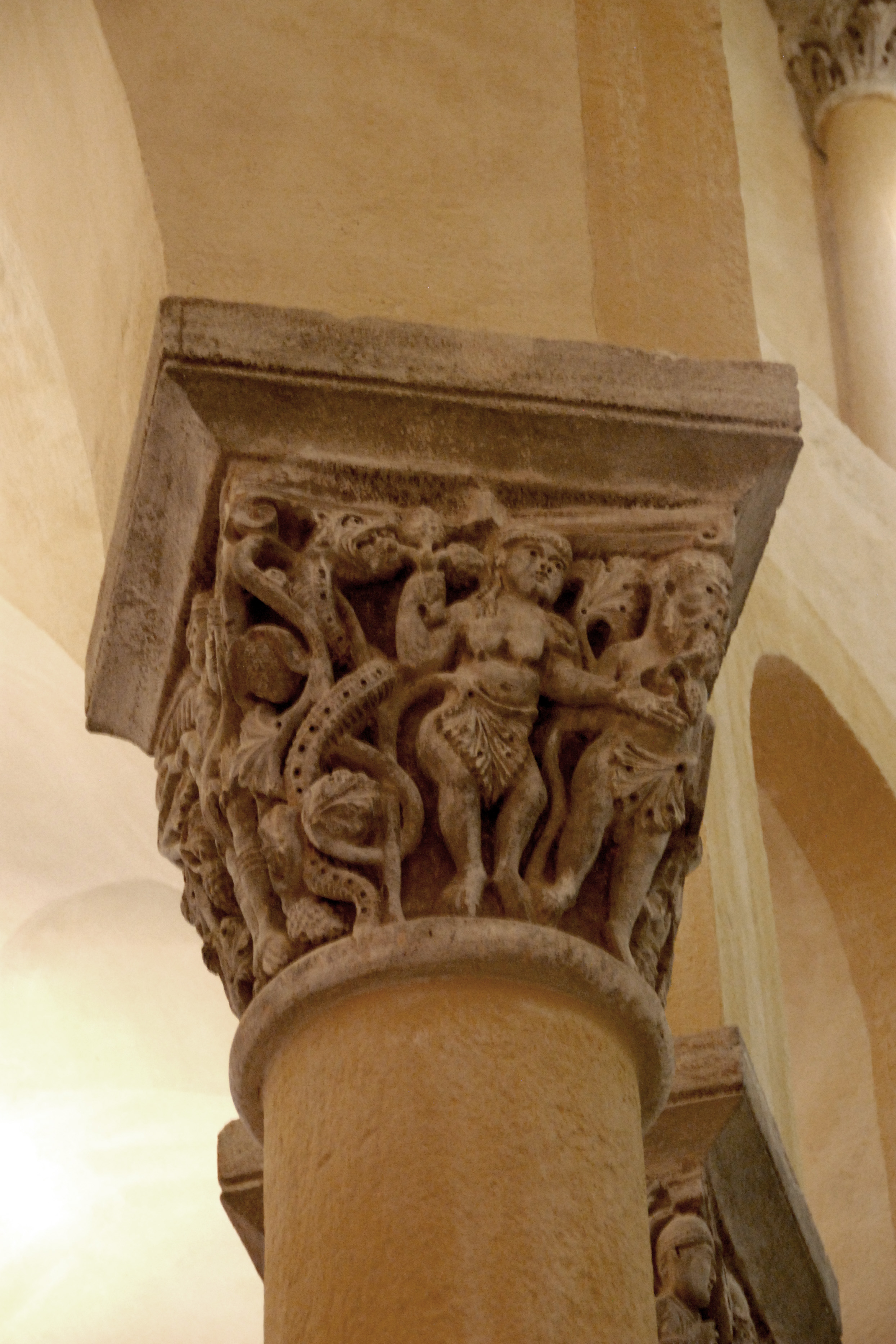 Notre-Dame du Port, Chorkapitell C, Seite 10